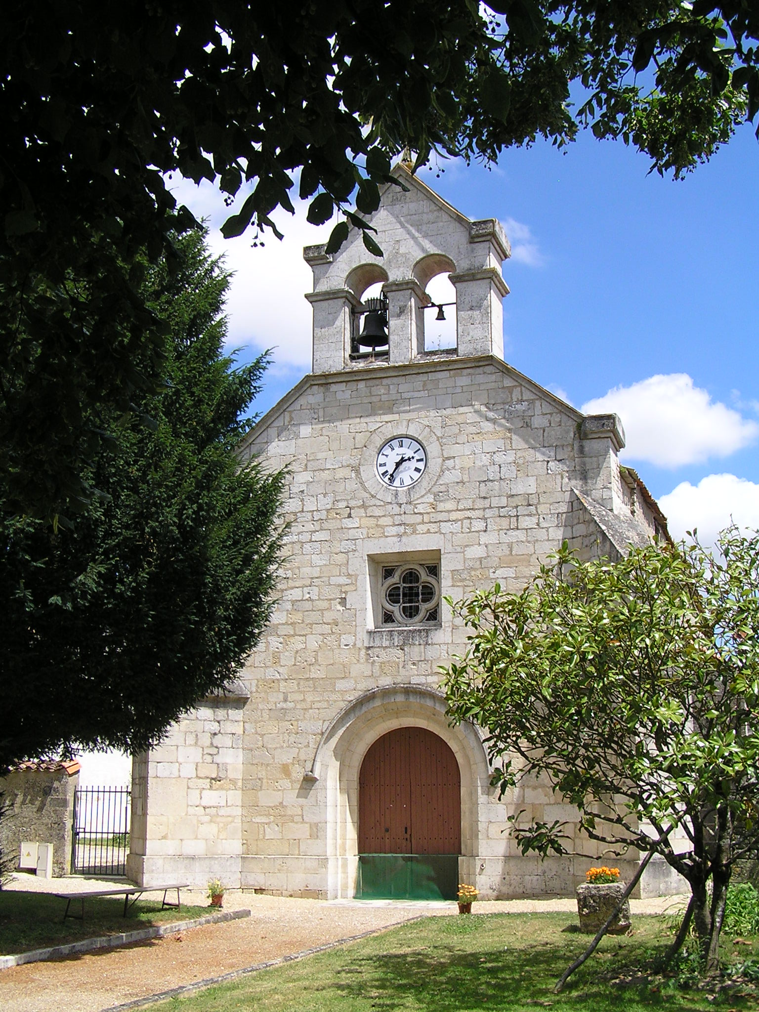 église de Barbezières, Charente, France